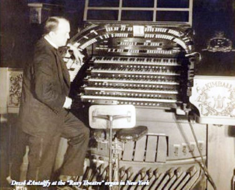 Antalffy-Zsiross Dezső New Yorkban